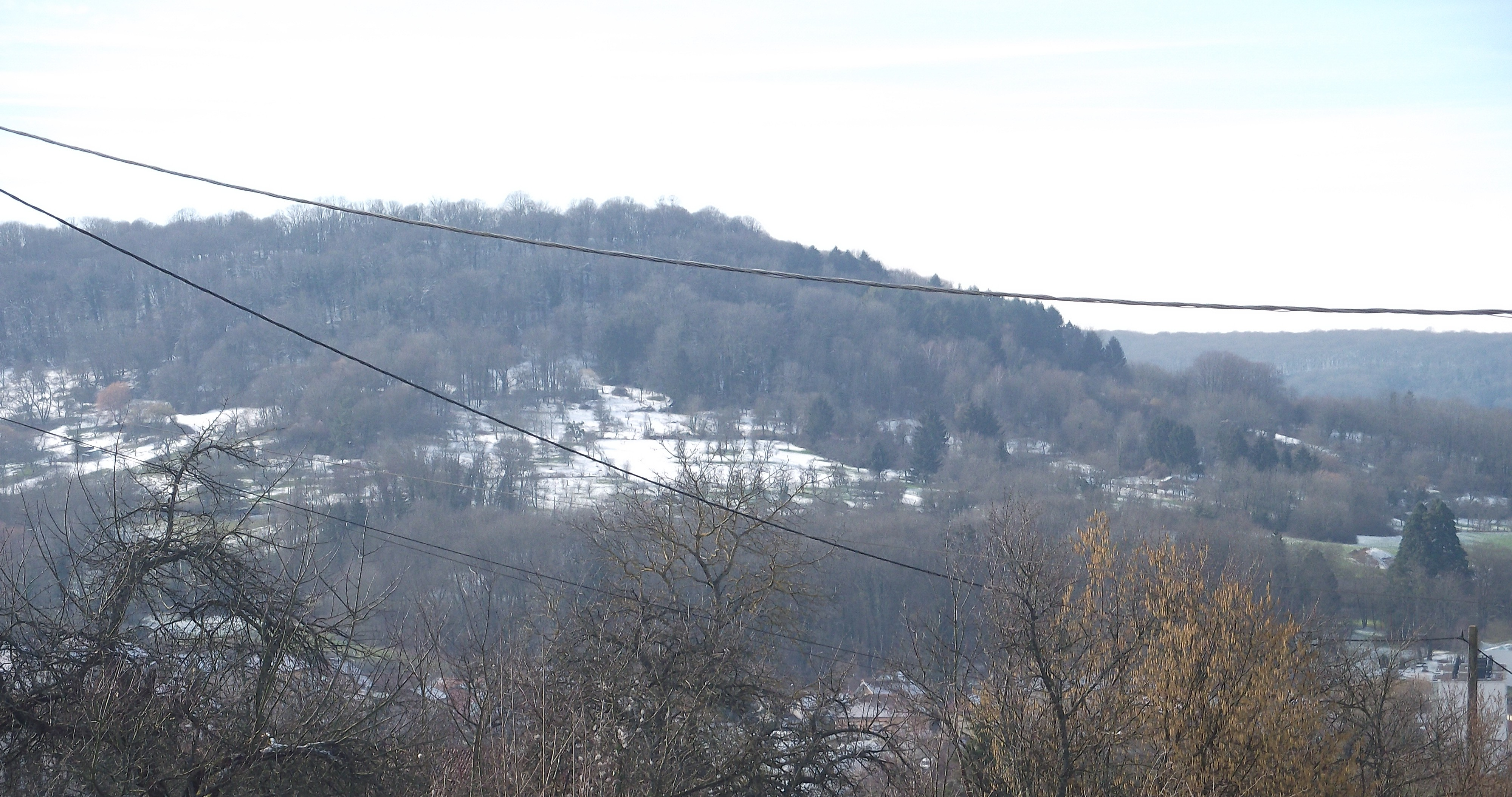 Le Plateau de Cita de Vesoul